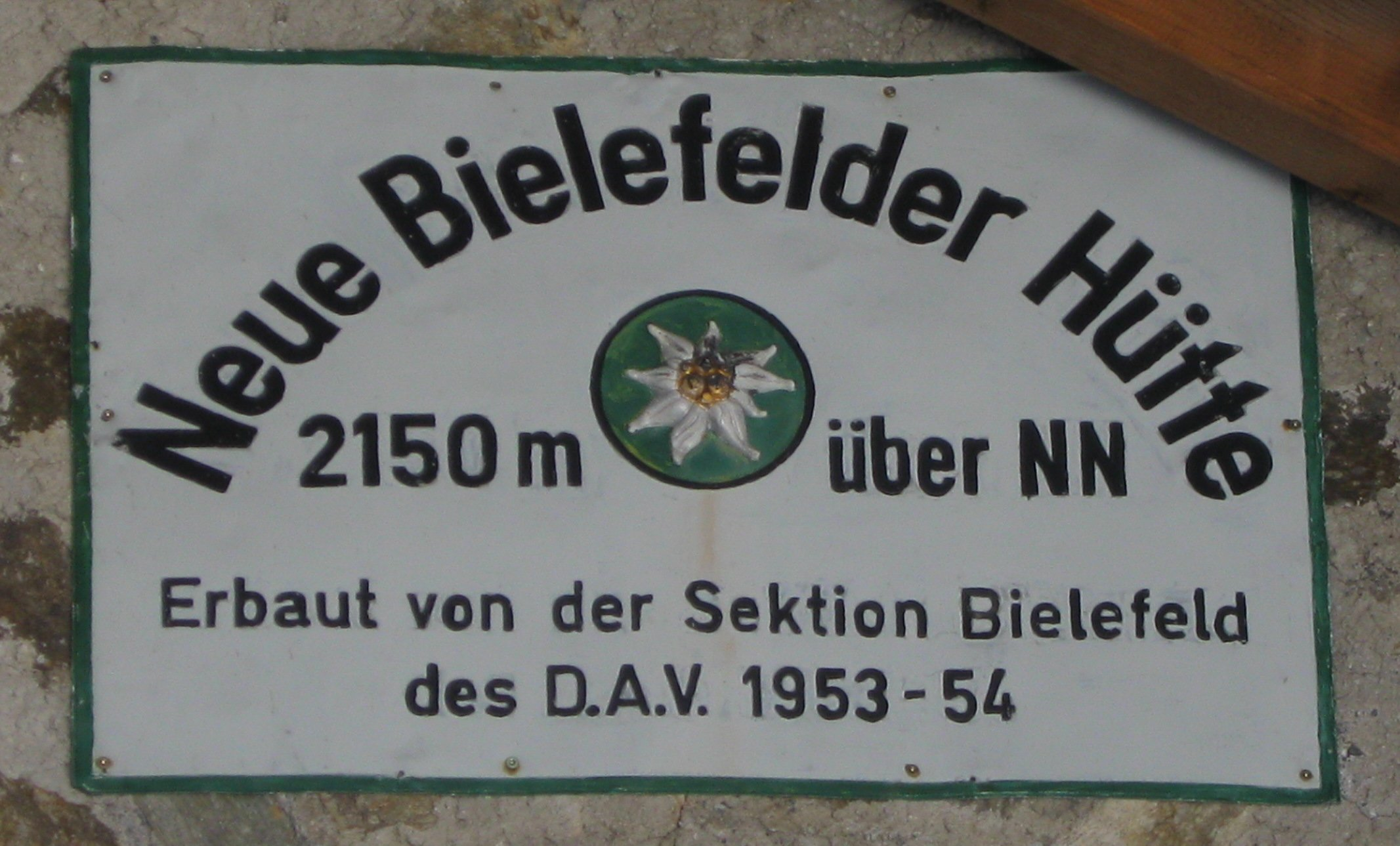 Das Türschild der Neuen Bielfelder Hütte